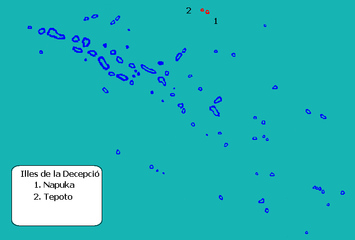 Mapa de localització de la comuna de Napuka, o illes de la Decepció, a l'arxipèlag Tuamotu, Polinèsia Francesa.